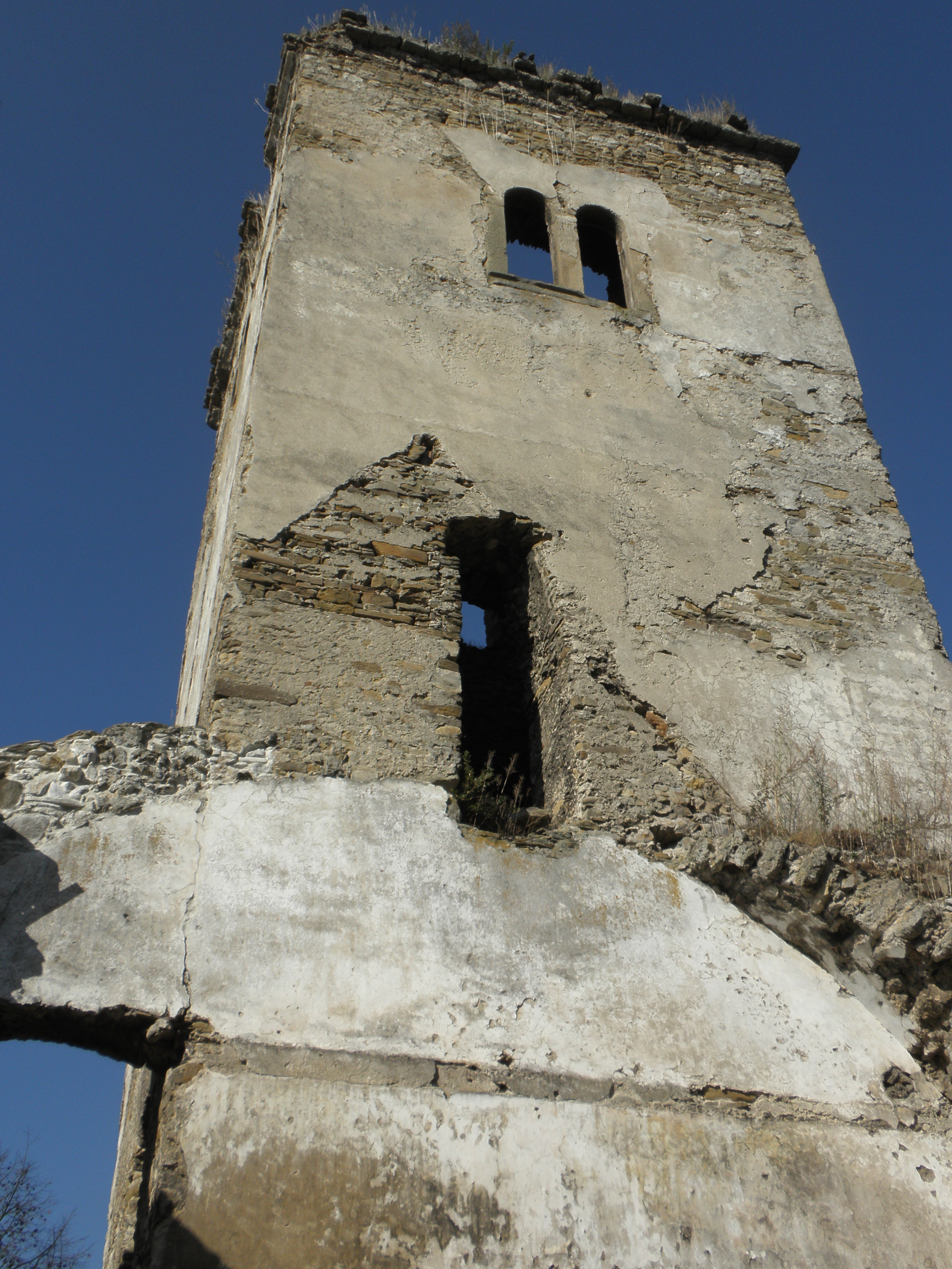 Veža kostola sv. Kozmu a Damiána